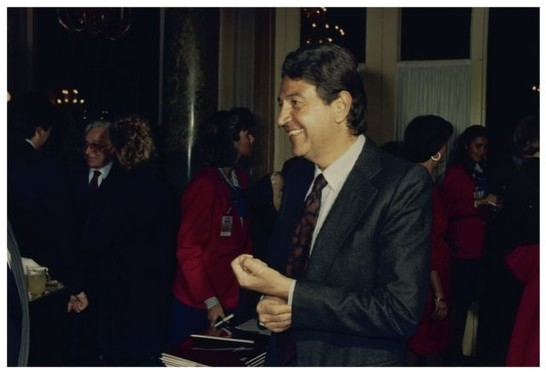 Presentazione Enciclopedia "Il Parlamento Italiano" di Mondadori